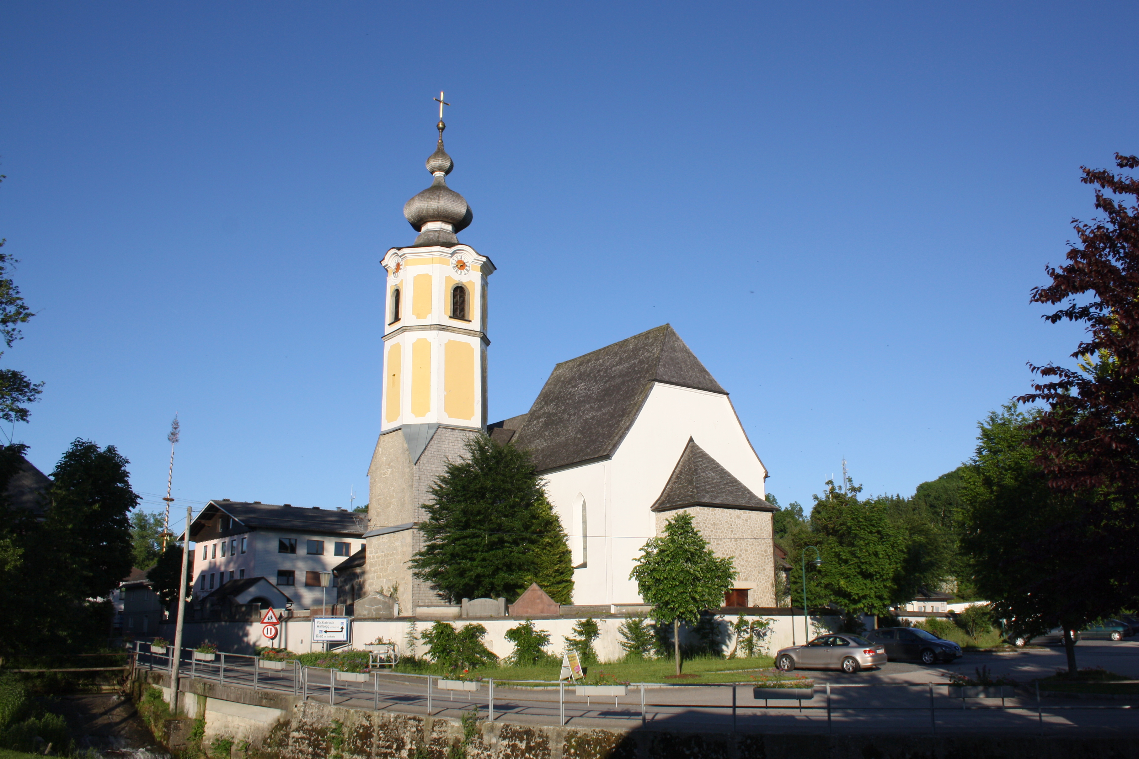 Die Pfarrkirche der oberösterreichischen Gemeinde Ungenach